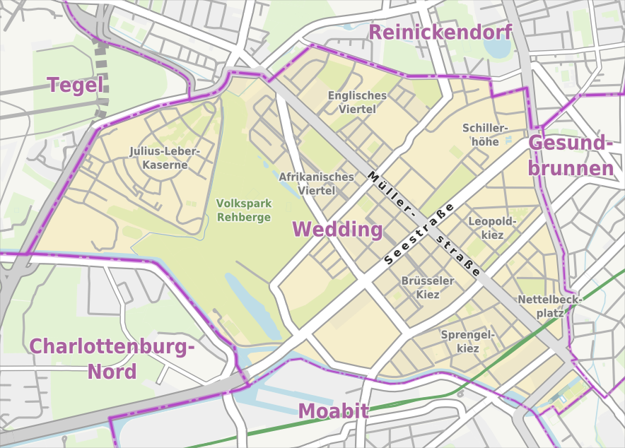 Übersichtskarte der Straßen und Ortslagen in Berlin-Wedding